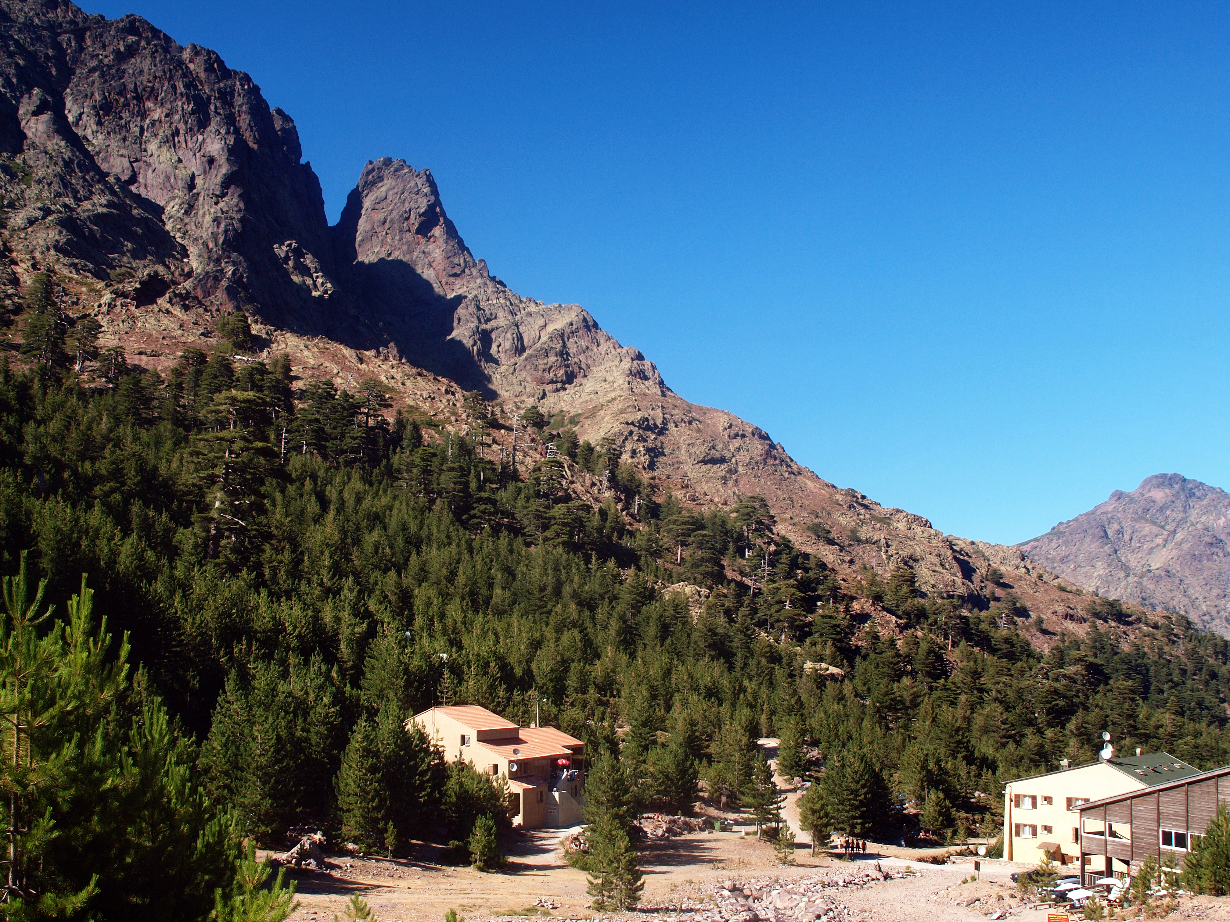 Asco (Corsica) - Plateau du Stagnu (ancienne station de ski)